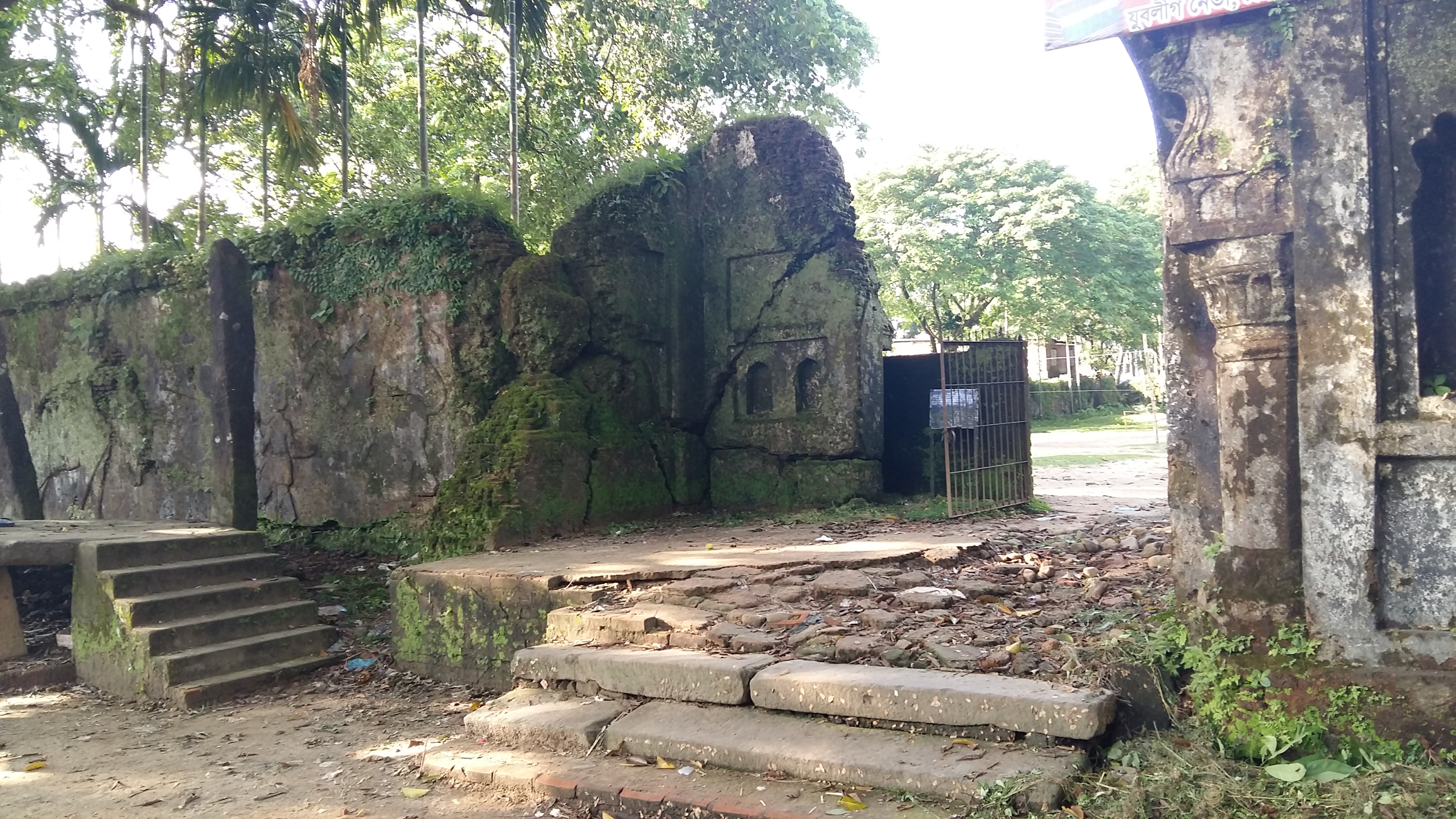 জয়েন্তশ্বরীর সম্মুখভাগ